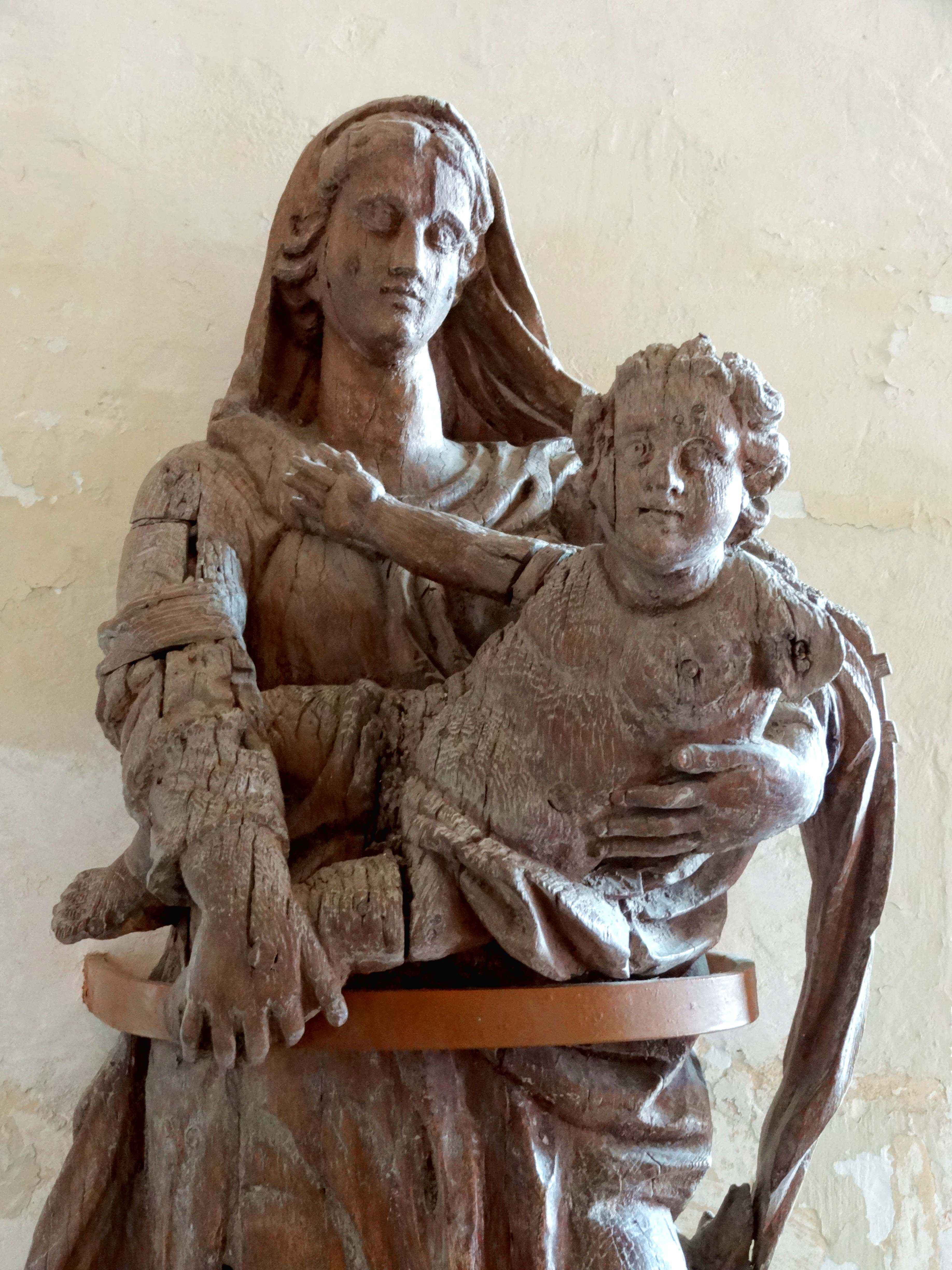 Mobilier de l'église - voir titre.